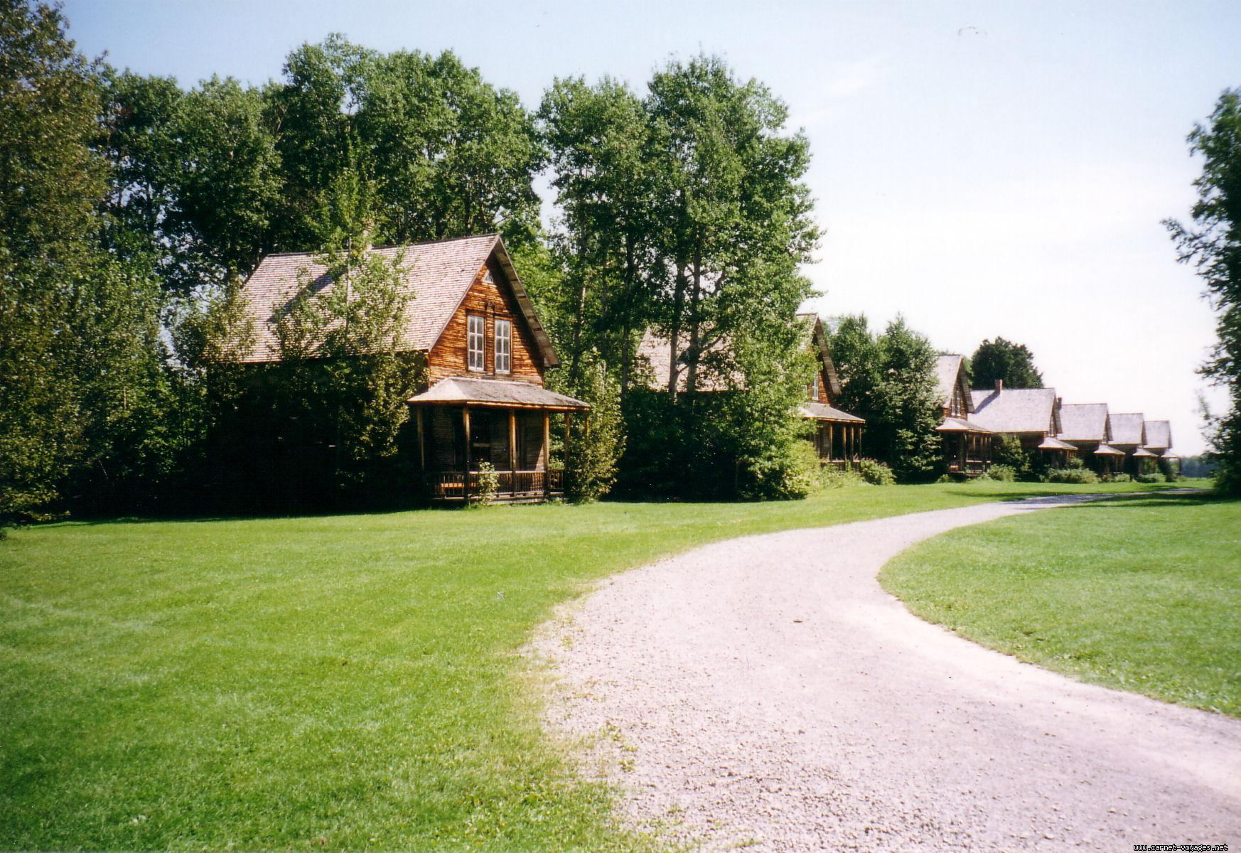 Description: Maisons en ruine du village fantome de Val Jalbert. Auteur: Juju ( Site